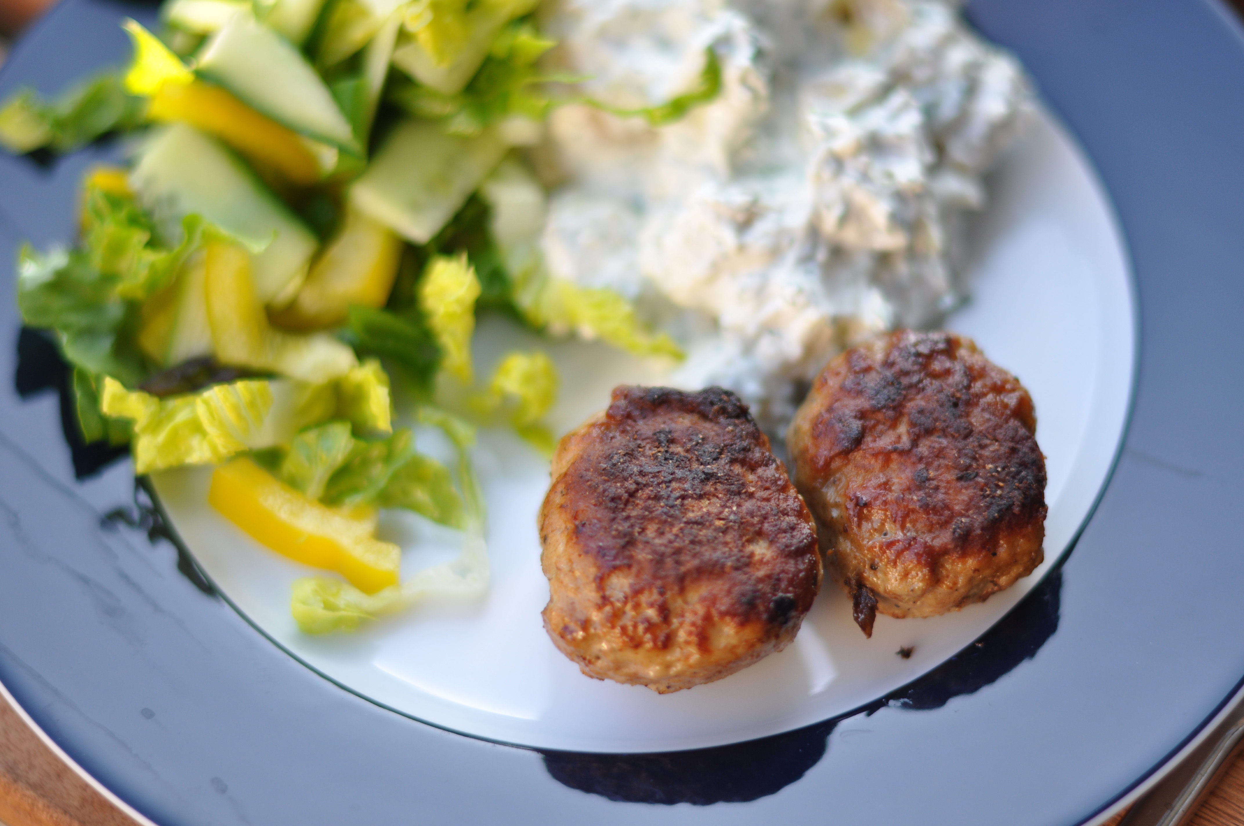 Frikadeller, salat og kartoffelsalat